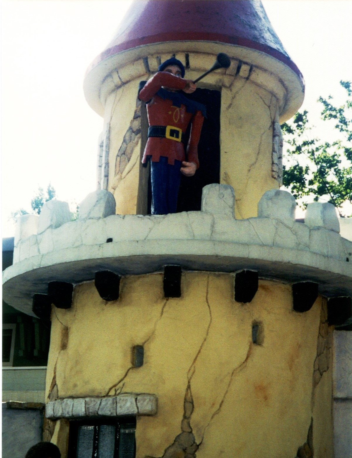 Incontestablement